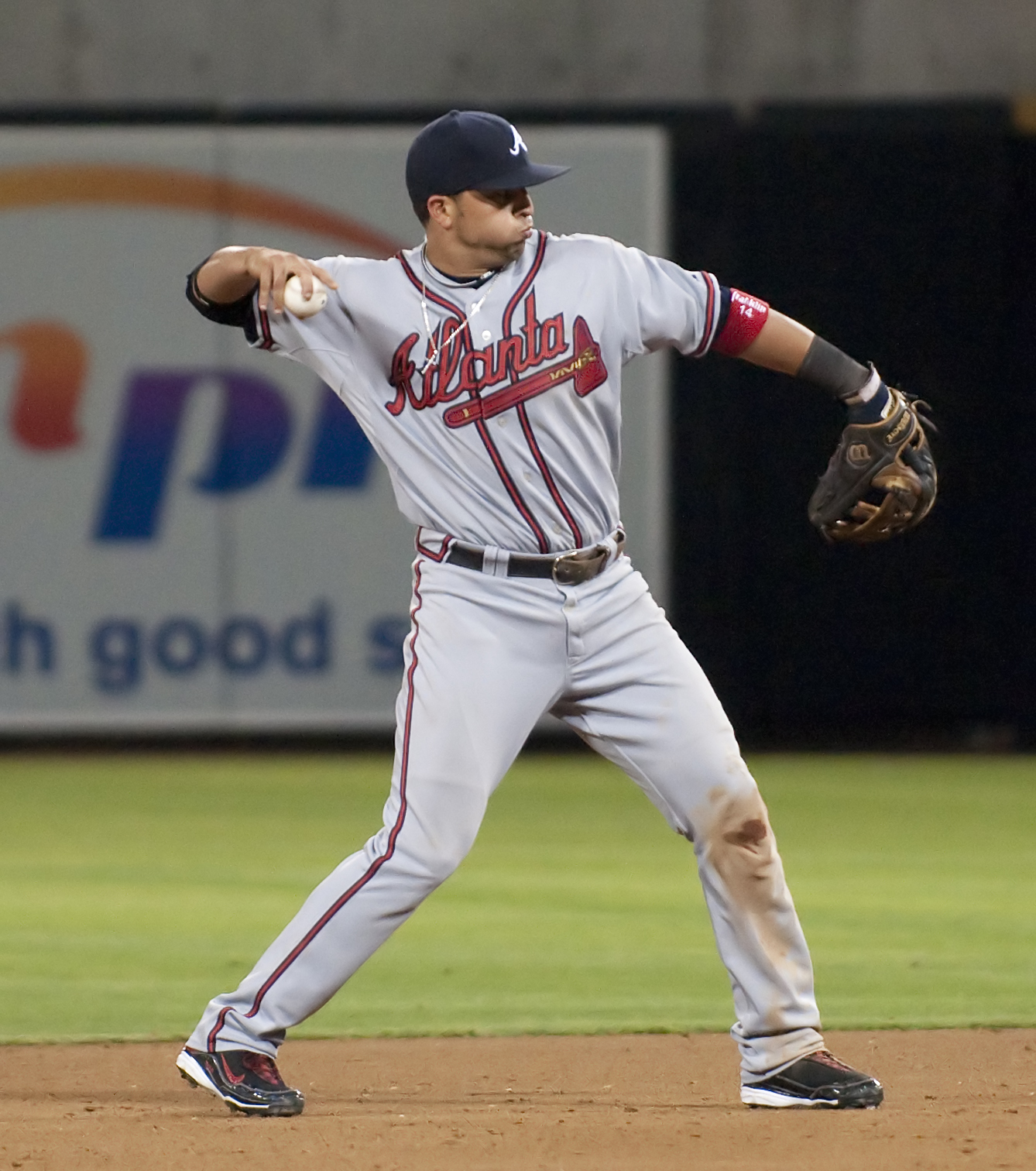 Martín Prado